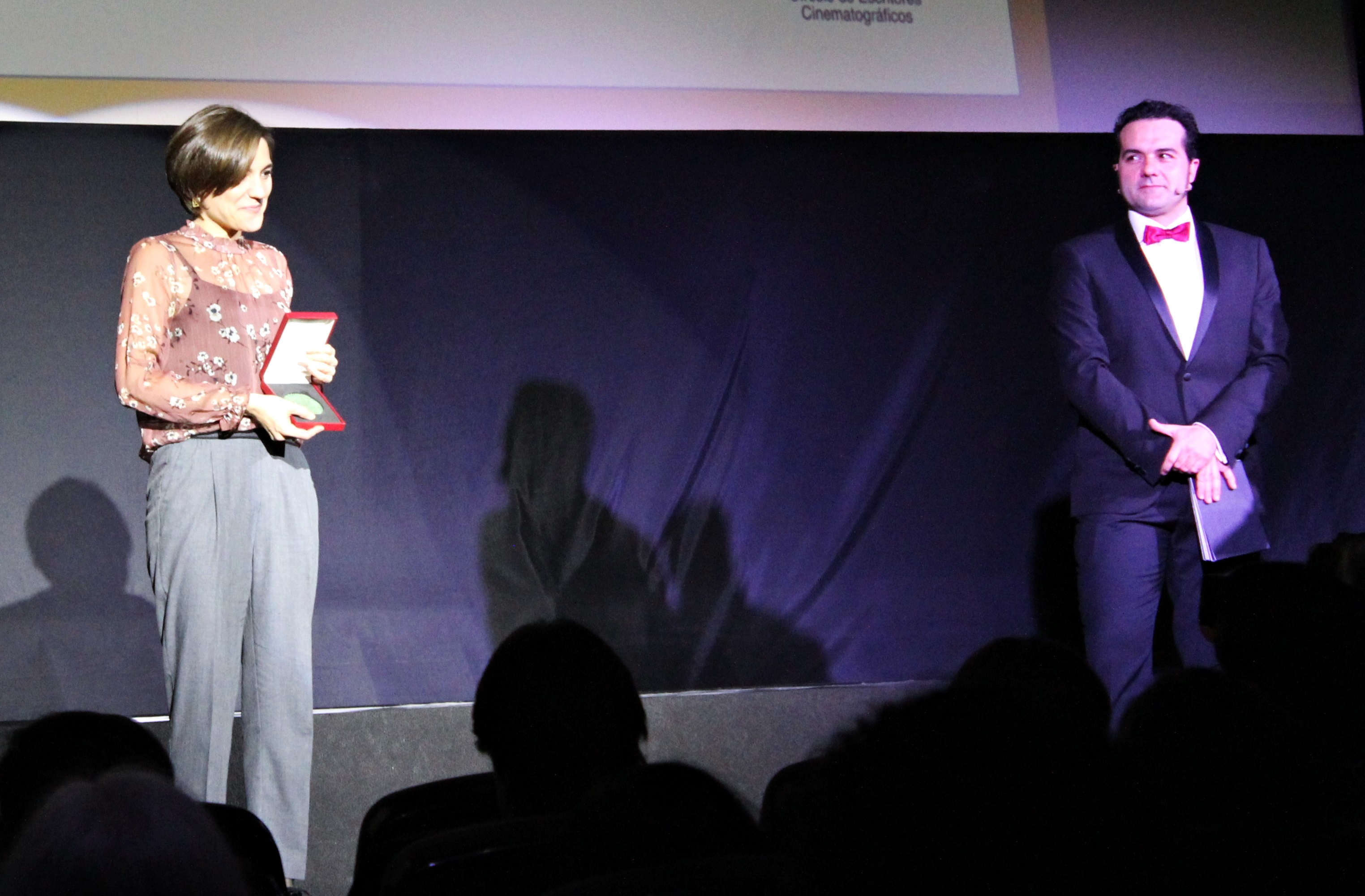 La escritora y directora Carla Simón recibe del actor y director Alfonso Sánchez la Medalla del Círculo de Escritores Cinematográficos a la directora revelación en la edición de 2017 por su trabajo en la película Verano 1993.